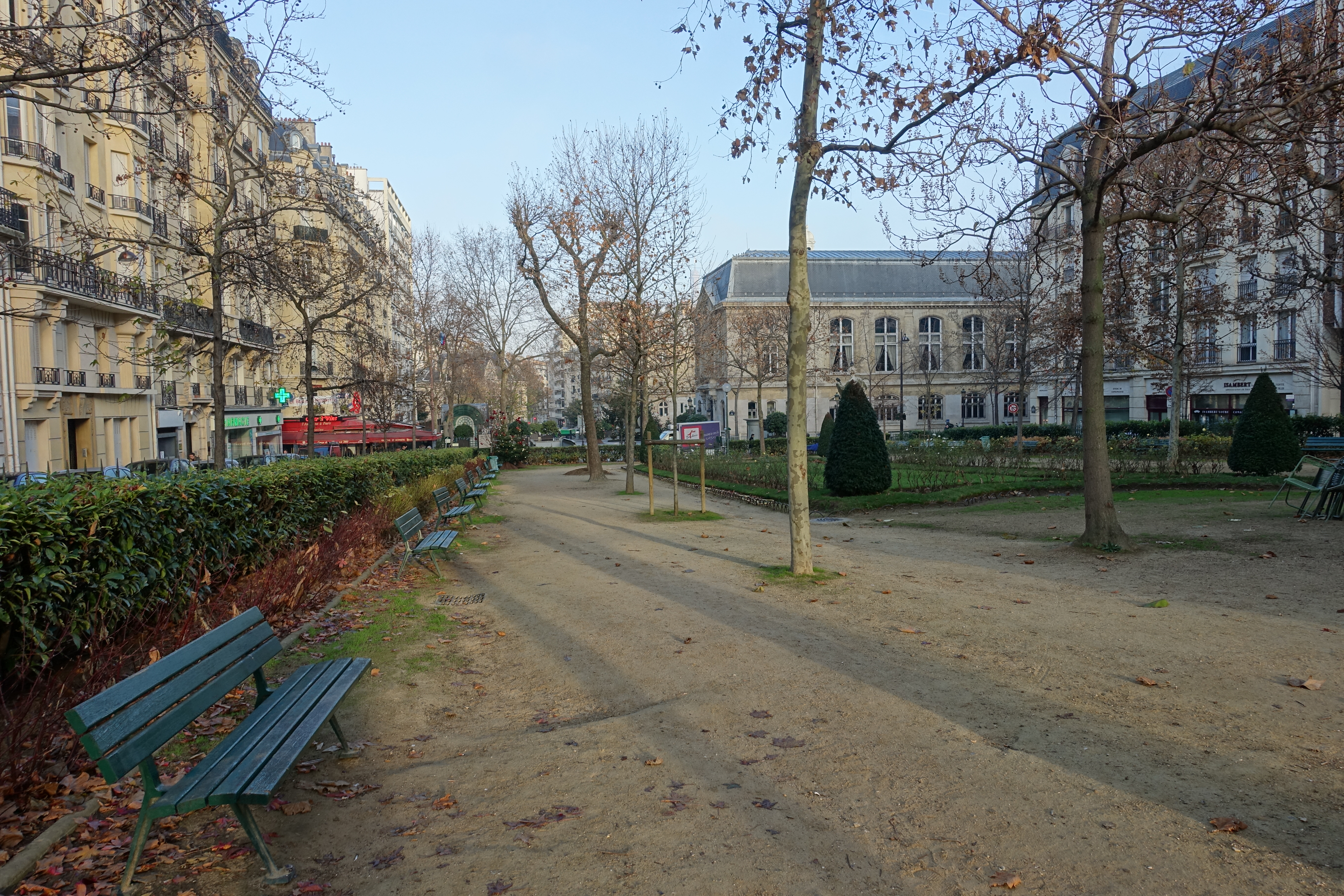 Square Adolphe Chérioux @ Paris